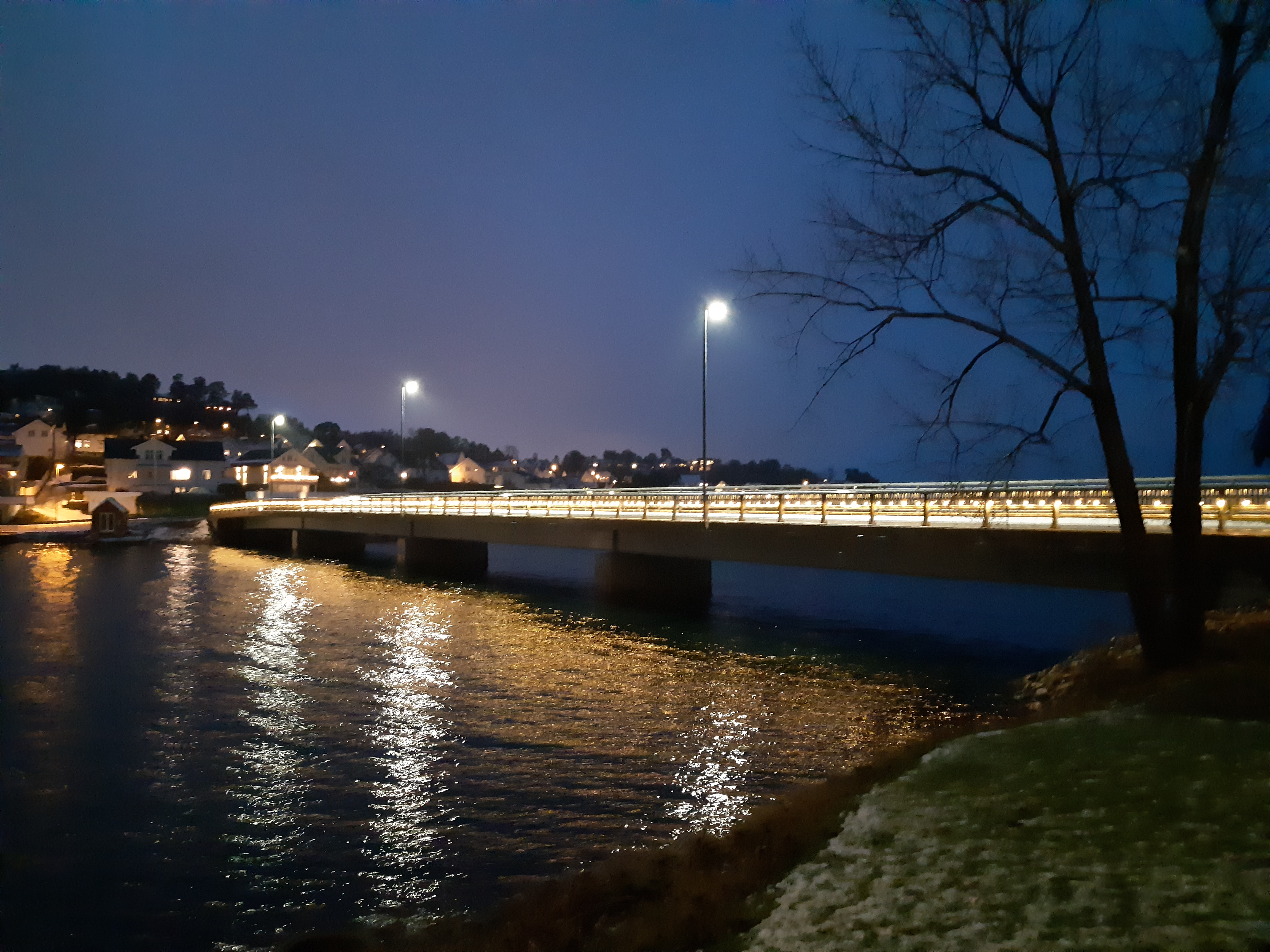 Jarlsøbrua i Husvik, Tønsberg, en desemberkveld.